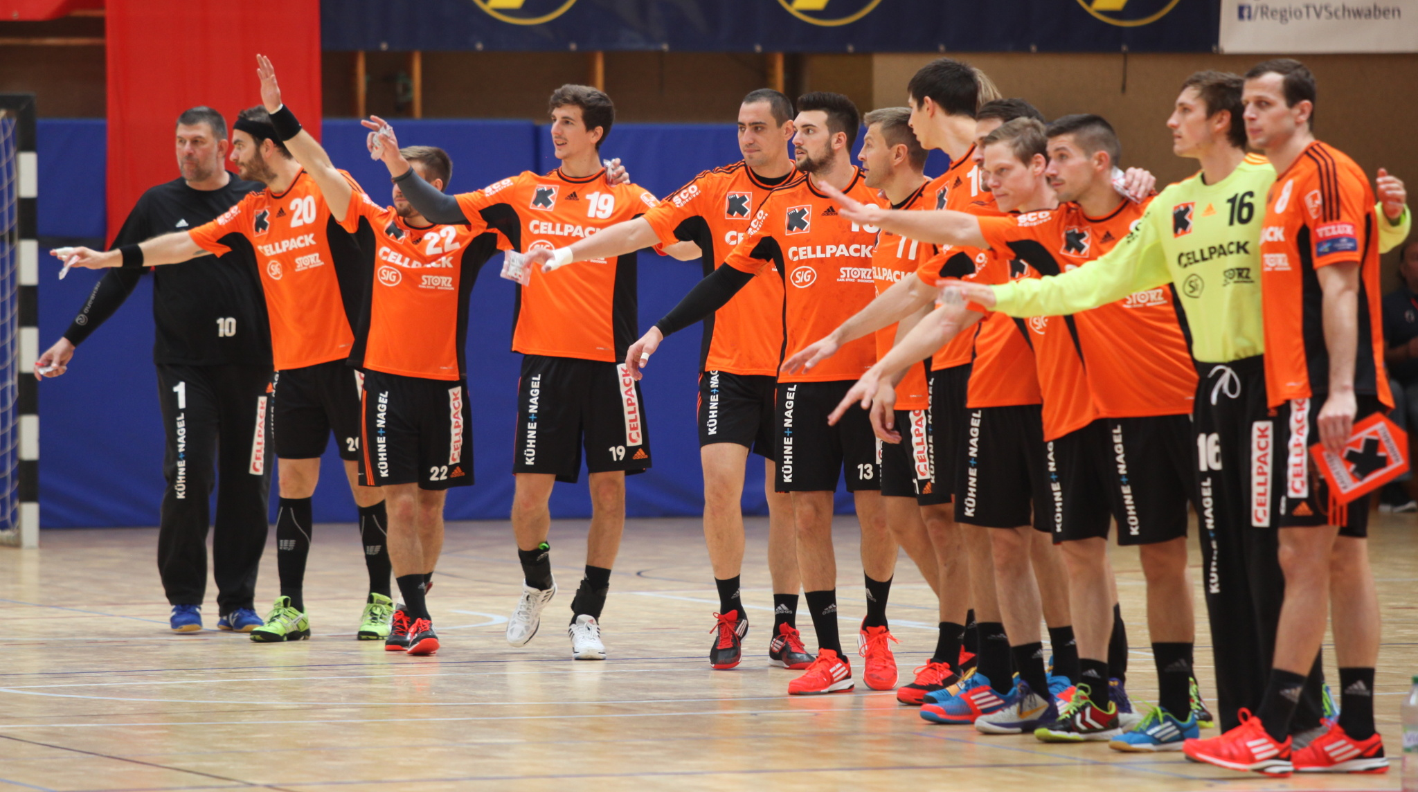 Die Mannschaft der Kadetten Schaffhausen am 17. August 2014 beim Sparkassen-Cup in Ehingen.